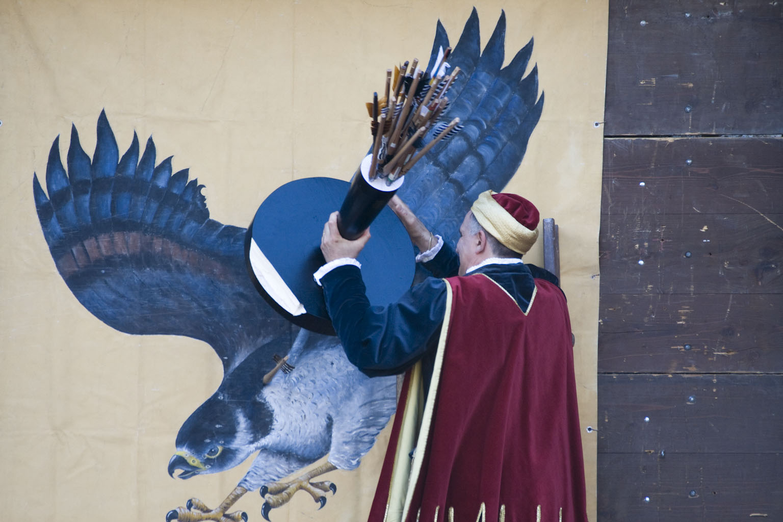 Massa Marittima (GR), prelievo del corniolo (bersaglio utilizzato durante il Balestro del Girifalco)